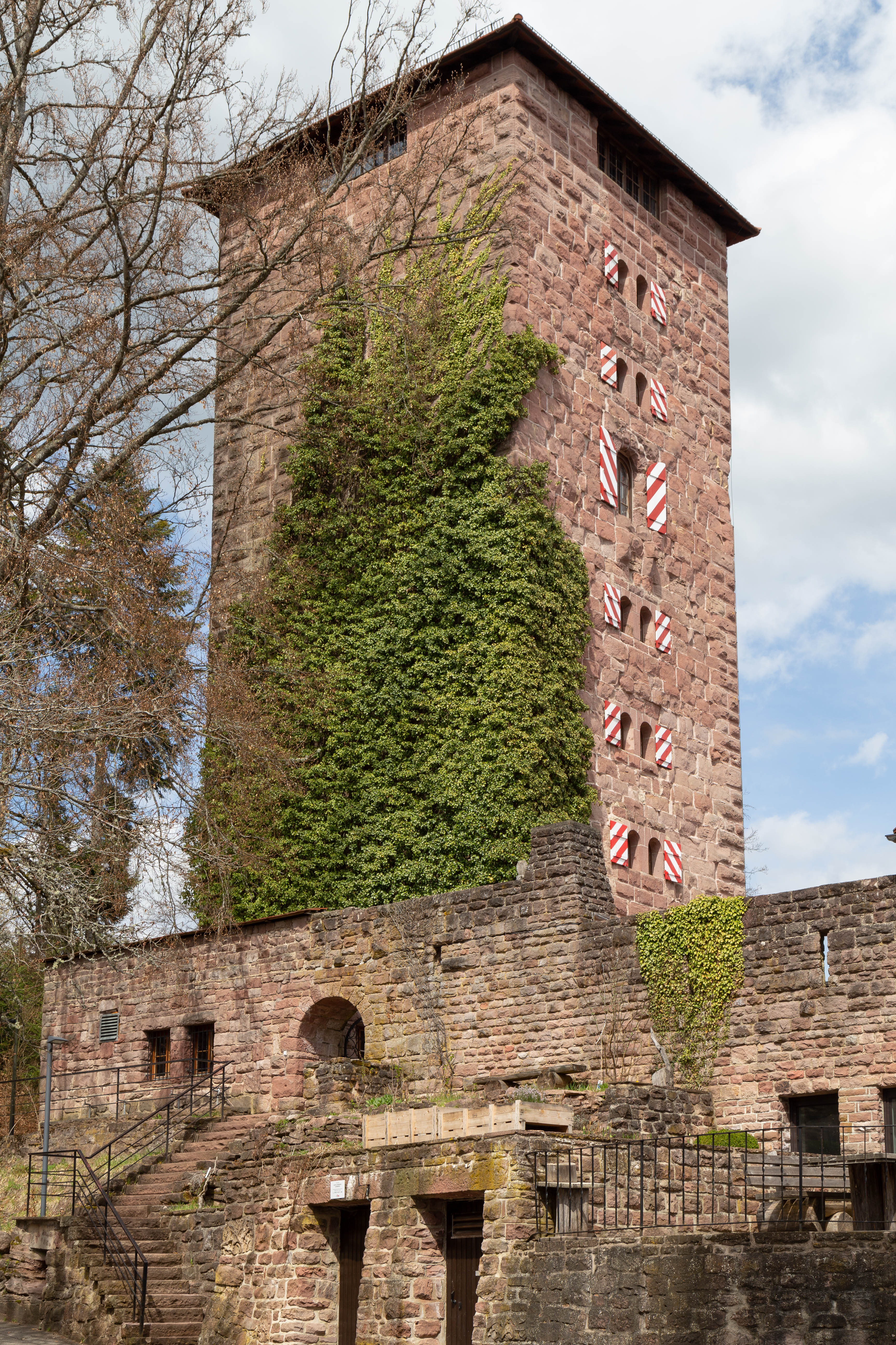 Burg Hornberg bei Altensteig im Schwarzwald